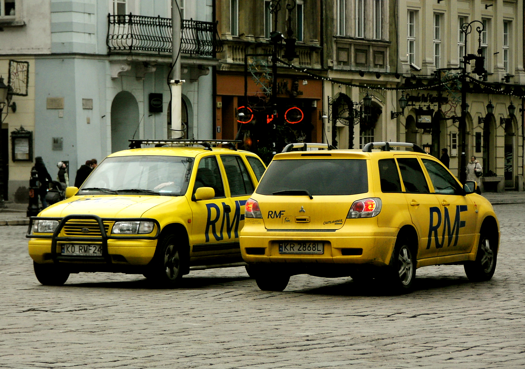 Wóz reporterski Radia RMF FM. Kia Sportage i Mitsubishi Outlander. Stary Rynek Poznań.